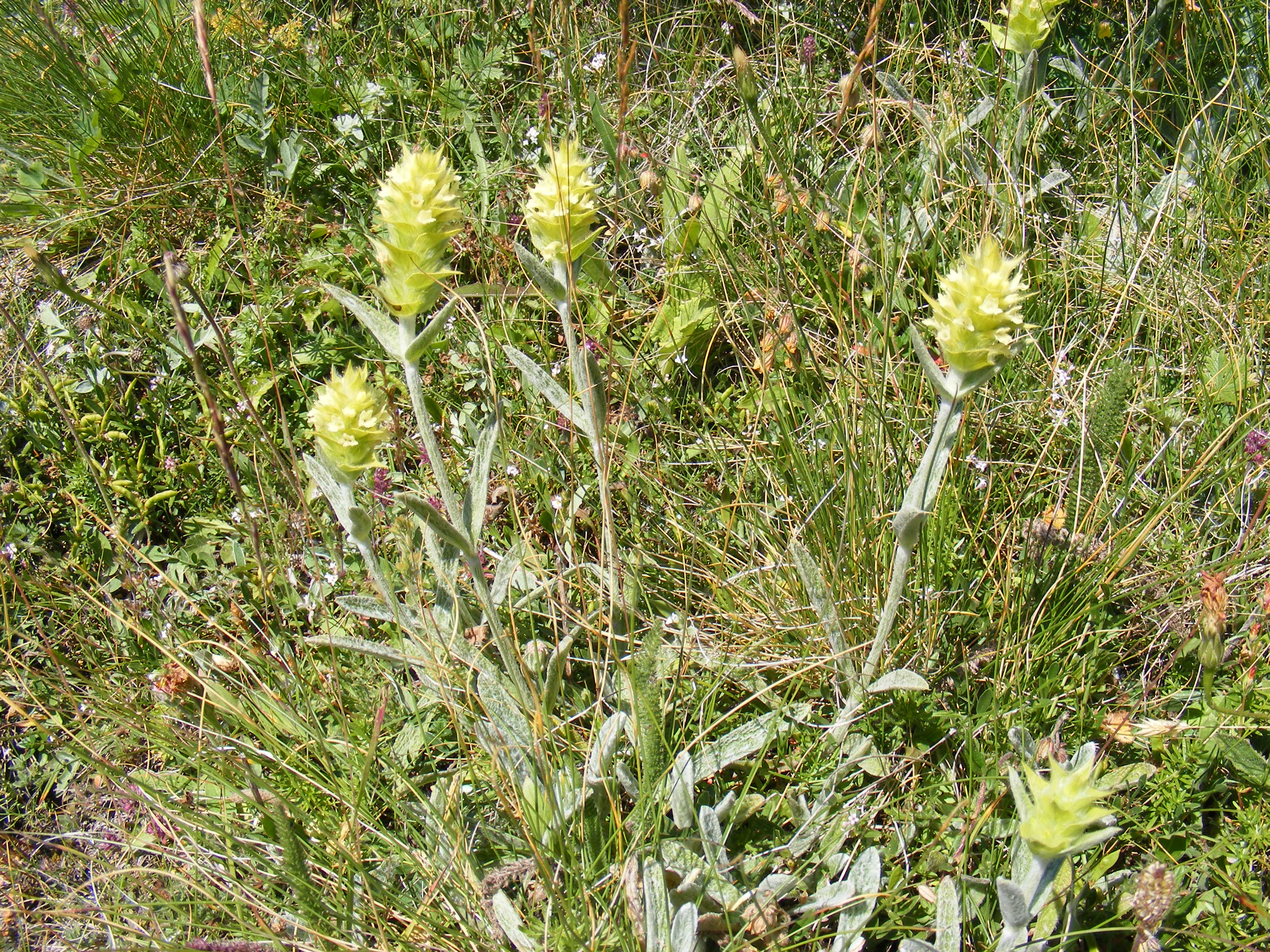 Мурсалски чай